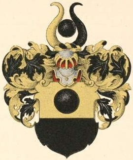 Kloti suguvõsa aadlivapp